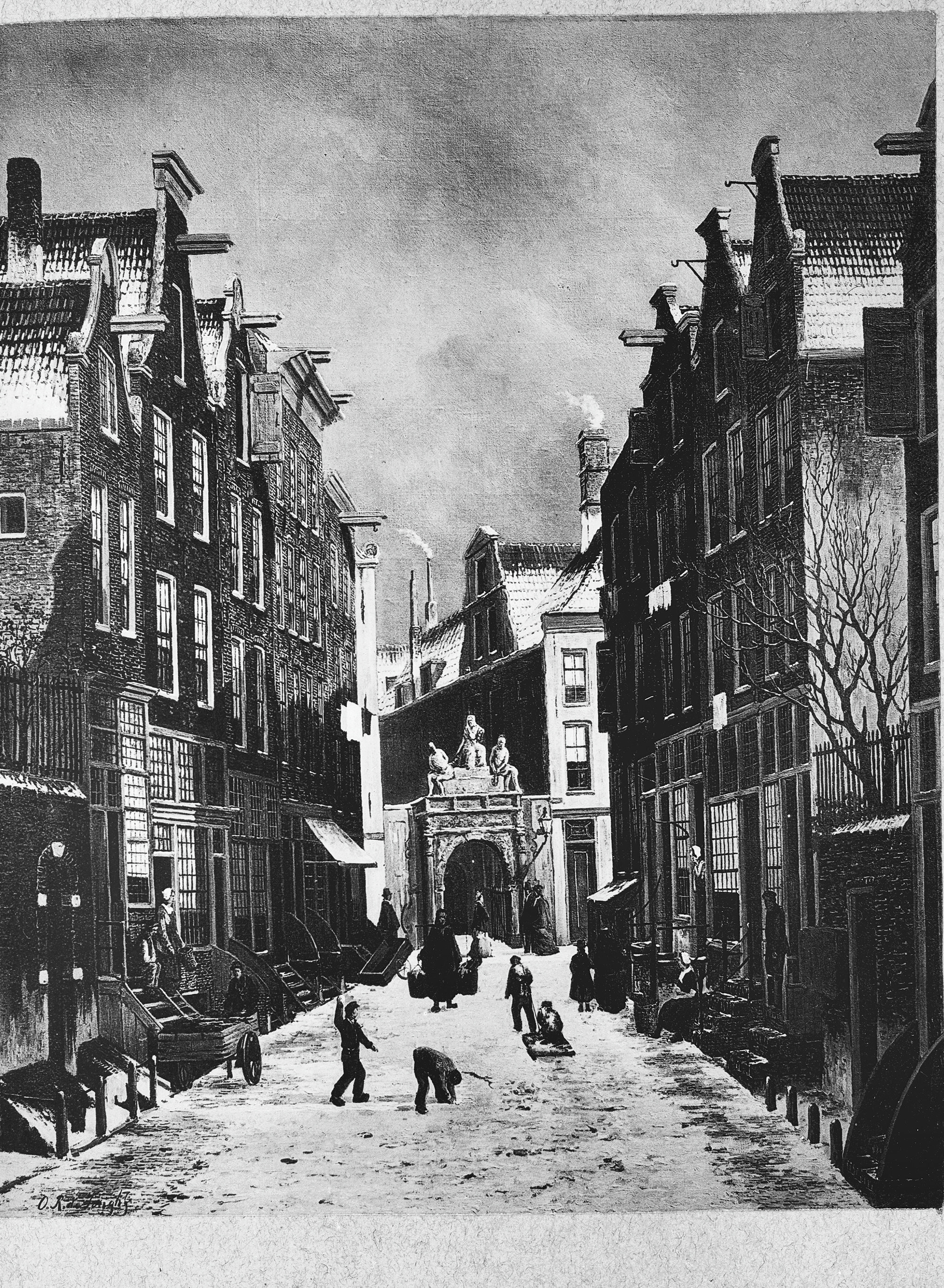 gevelsteen: Gezicht uit de Voetboogstr. op het Rasphuispoortje tekening O.R. de Jongh